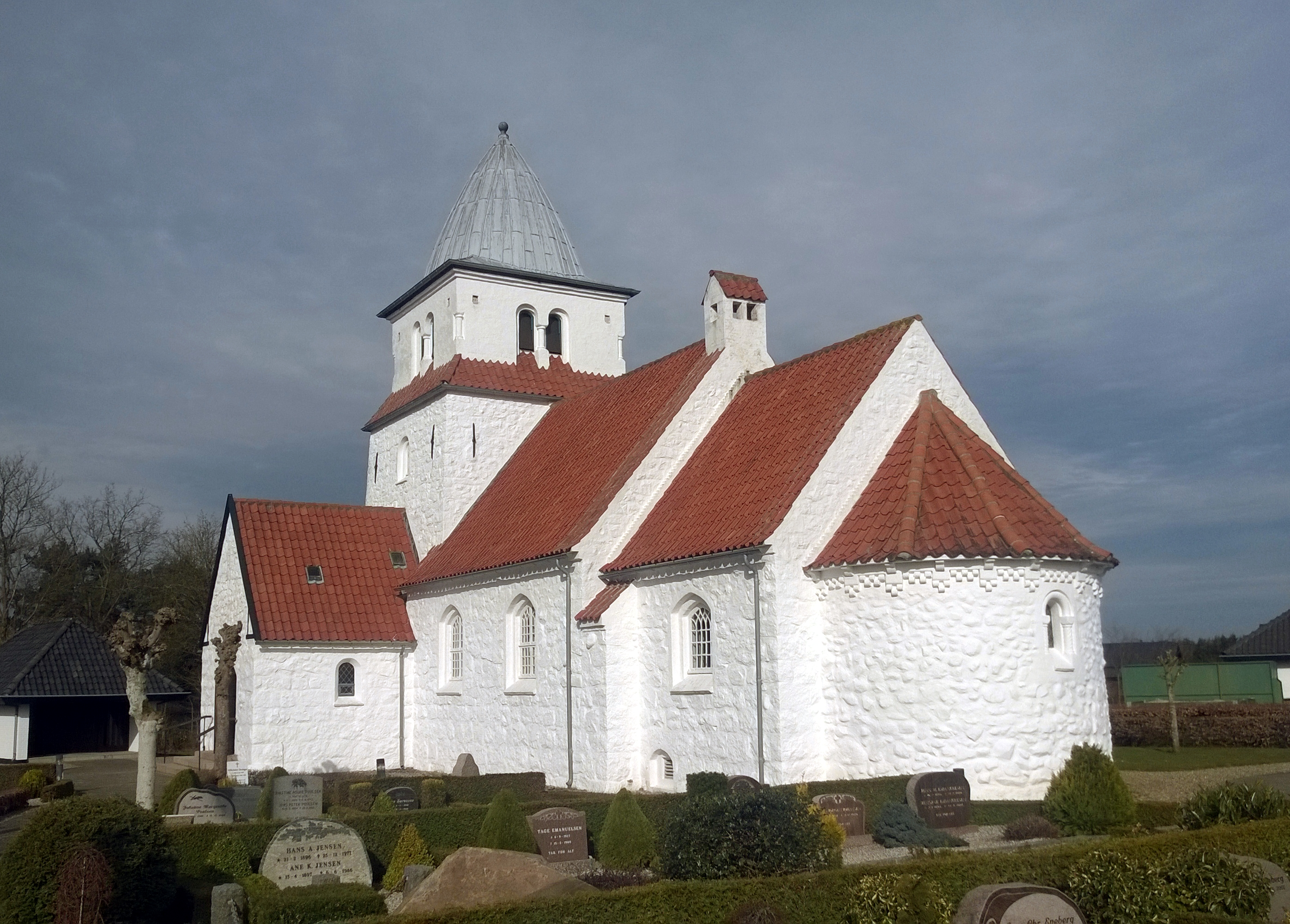 Kirken set fra SØ, foråret 2016